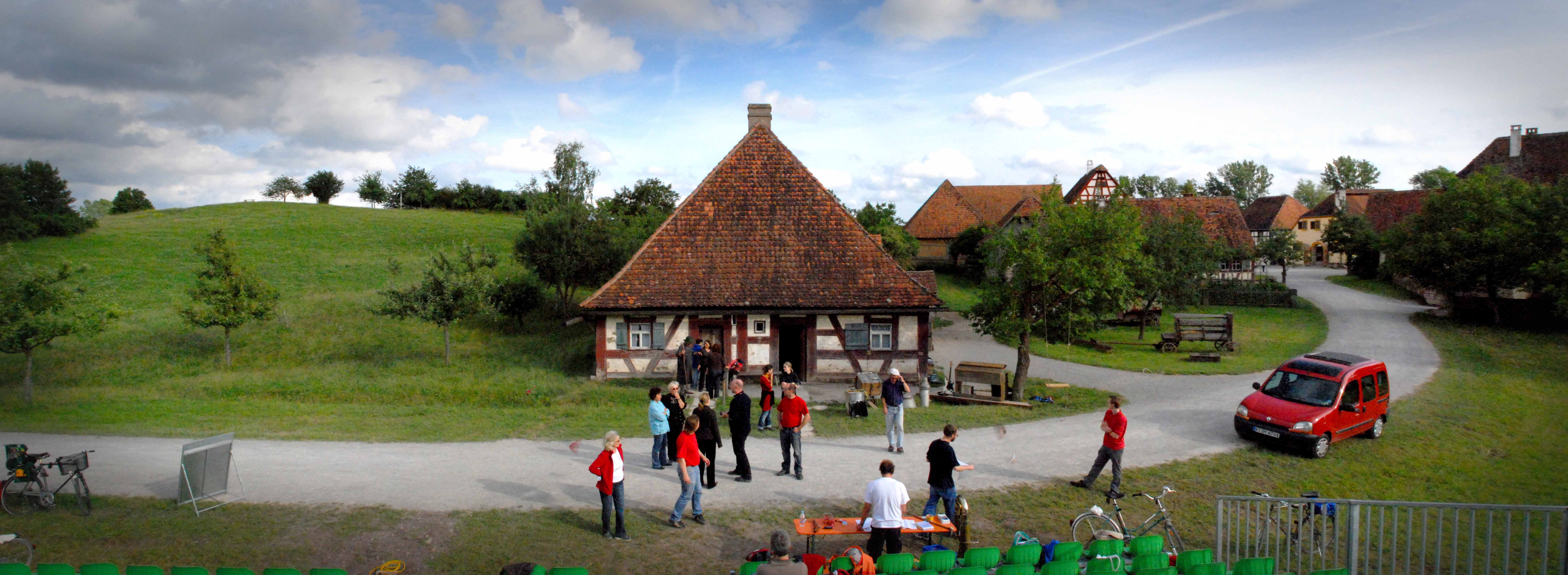 Freilandtheater Bad Windsheim Panorama